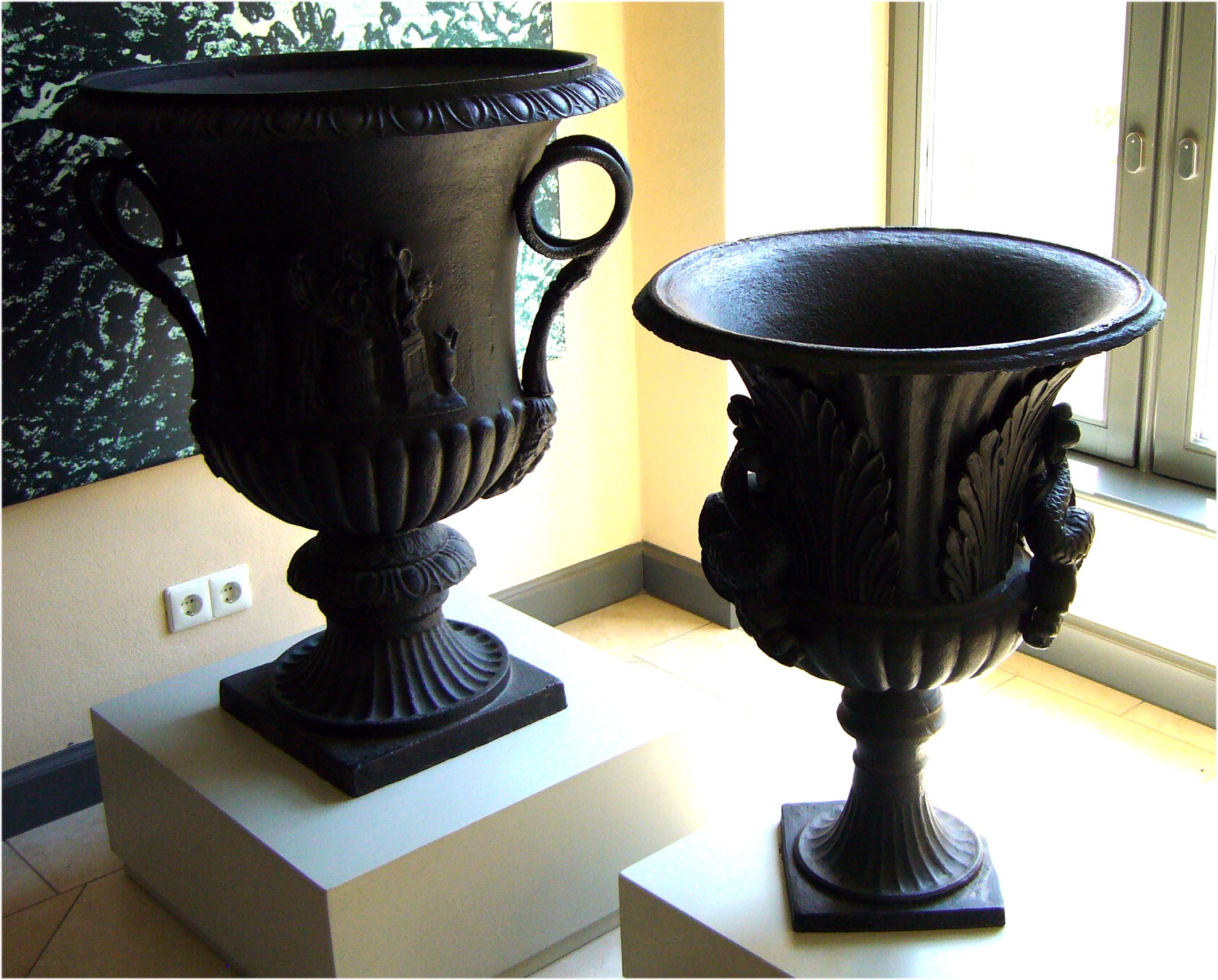 Pflanztöpfe, Eisenkunstguss